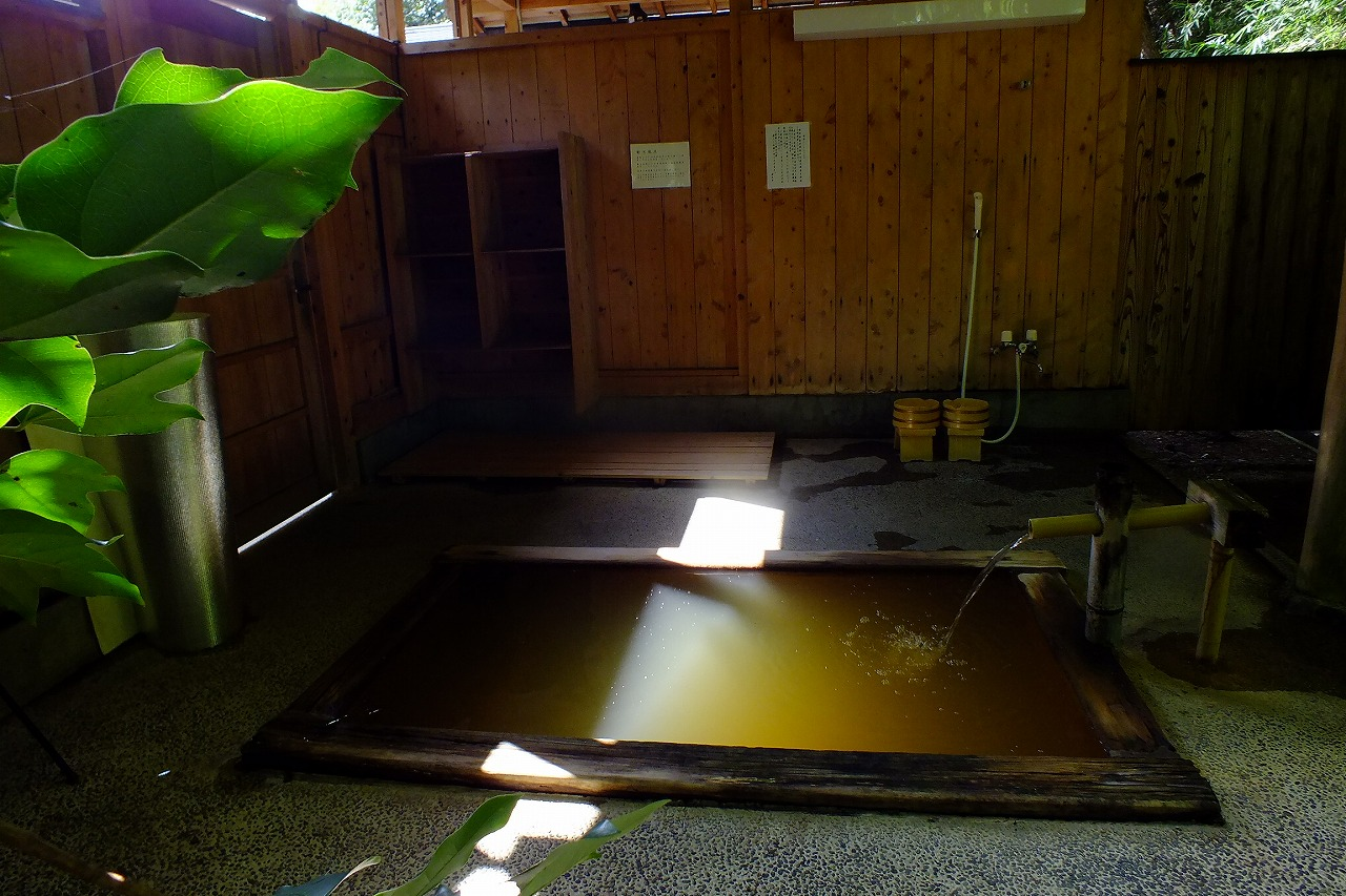 2015-10-01 Sioda-Onsen Ueyama Ryokan（湯元上山旅館）